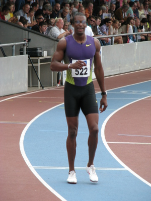 Isa Phillips beim DLV WM-Testwettkampf 2011 im Stadion der MTG Mannheim.